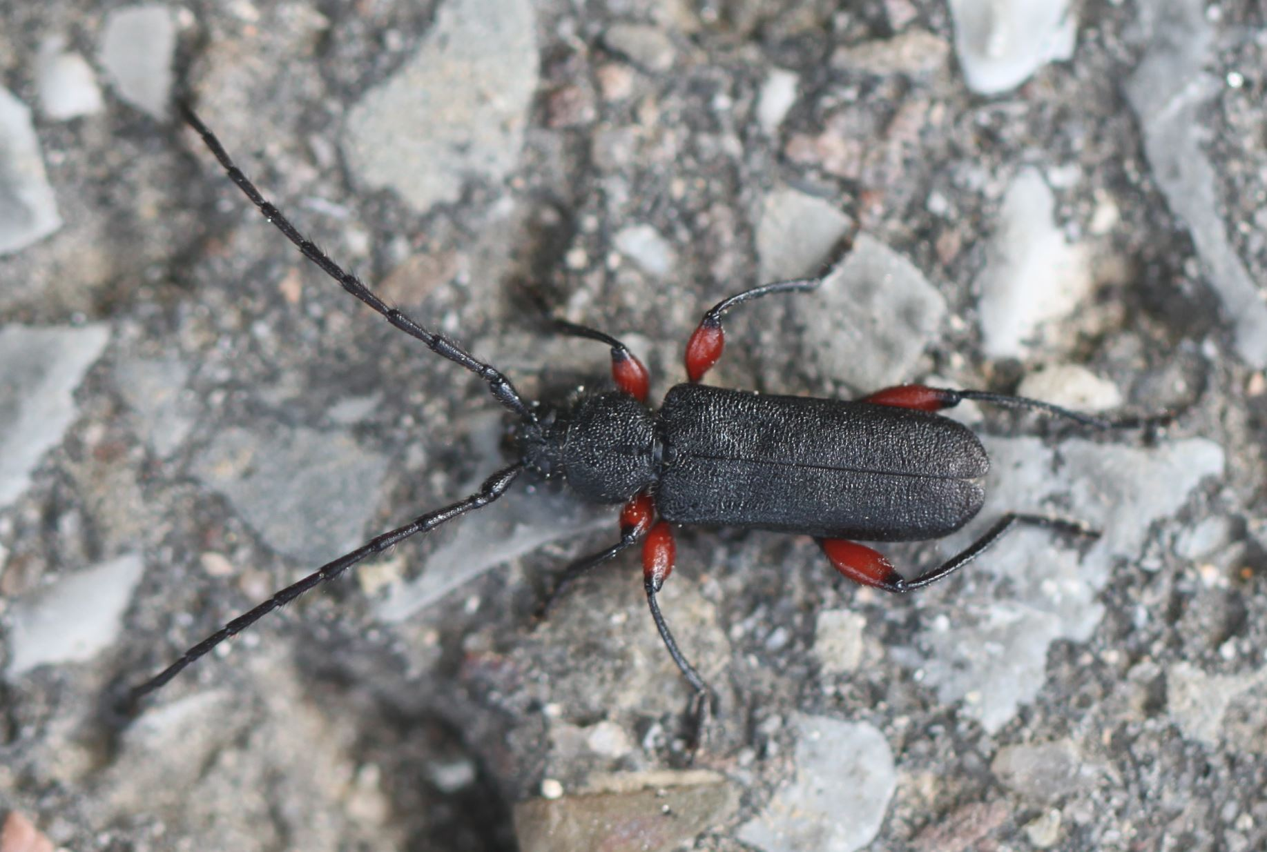 Mattschwarzer Scheibenbock (Ropalopus femoratus) am 3. Mai 2020 nahe Heidelberg